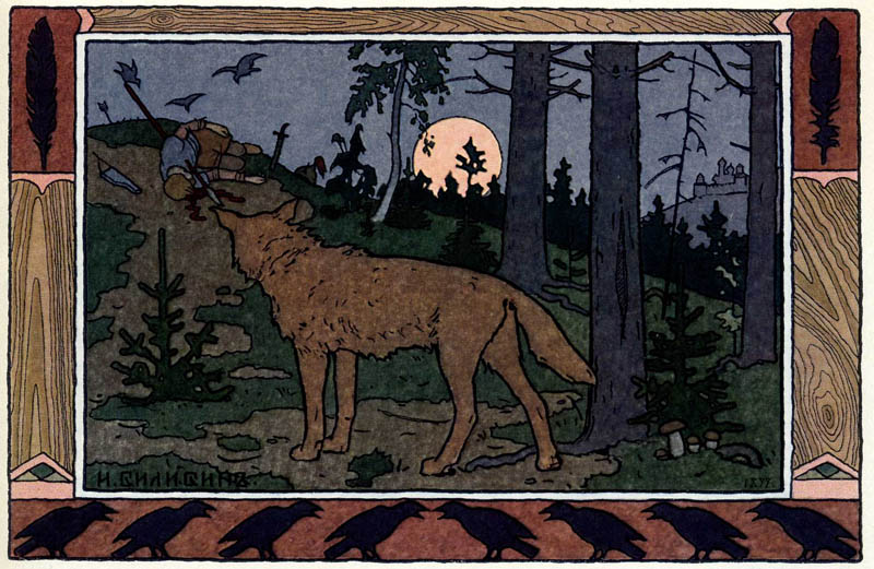 Мёртвый Иван Царевич и Серый Волк . Иллюстрация к Сказке об Иван-царевиче, Жар-птице и о Сером Волке